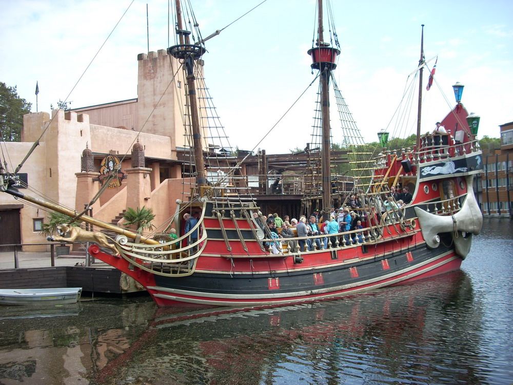 Kaptein Sabeltanns skip: Den sorte dame, fotografert i Kristiansand Dyrepark 2008